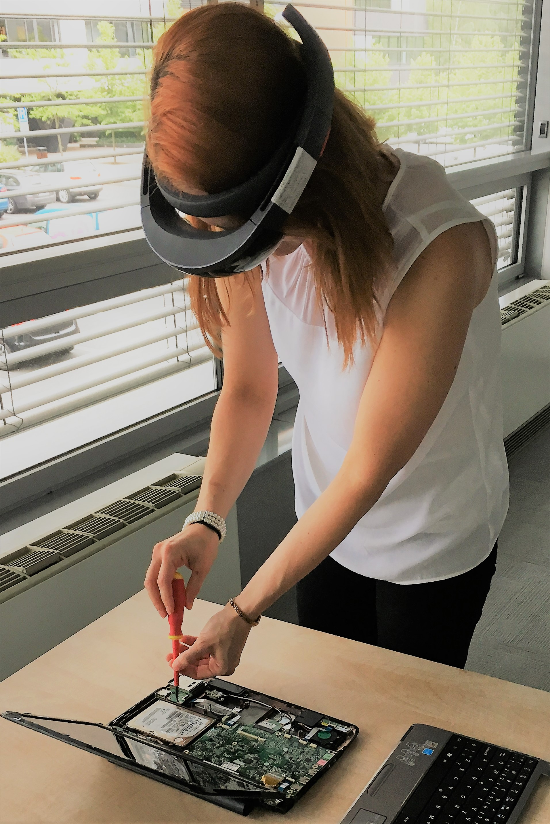 AR manual Misterine